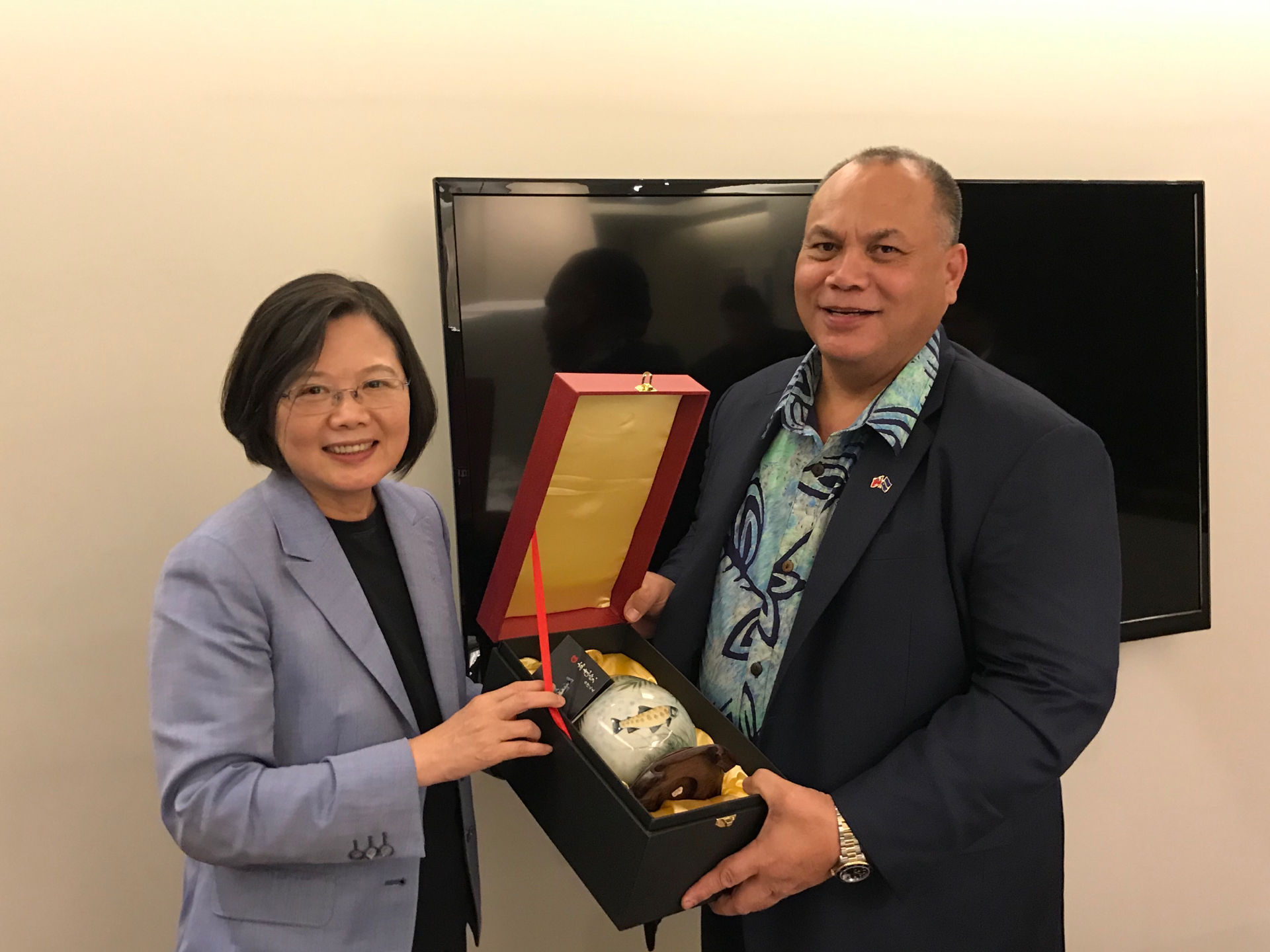 09.28 總統於官邸晚宴諾魯新任總統安格明(Lionel Aingimea)並致贈台灣精美手工藝品